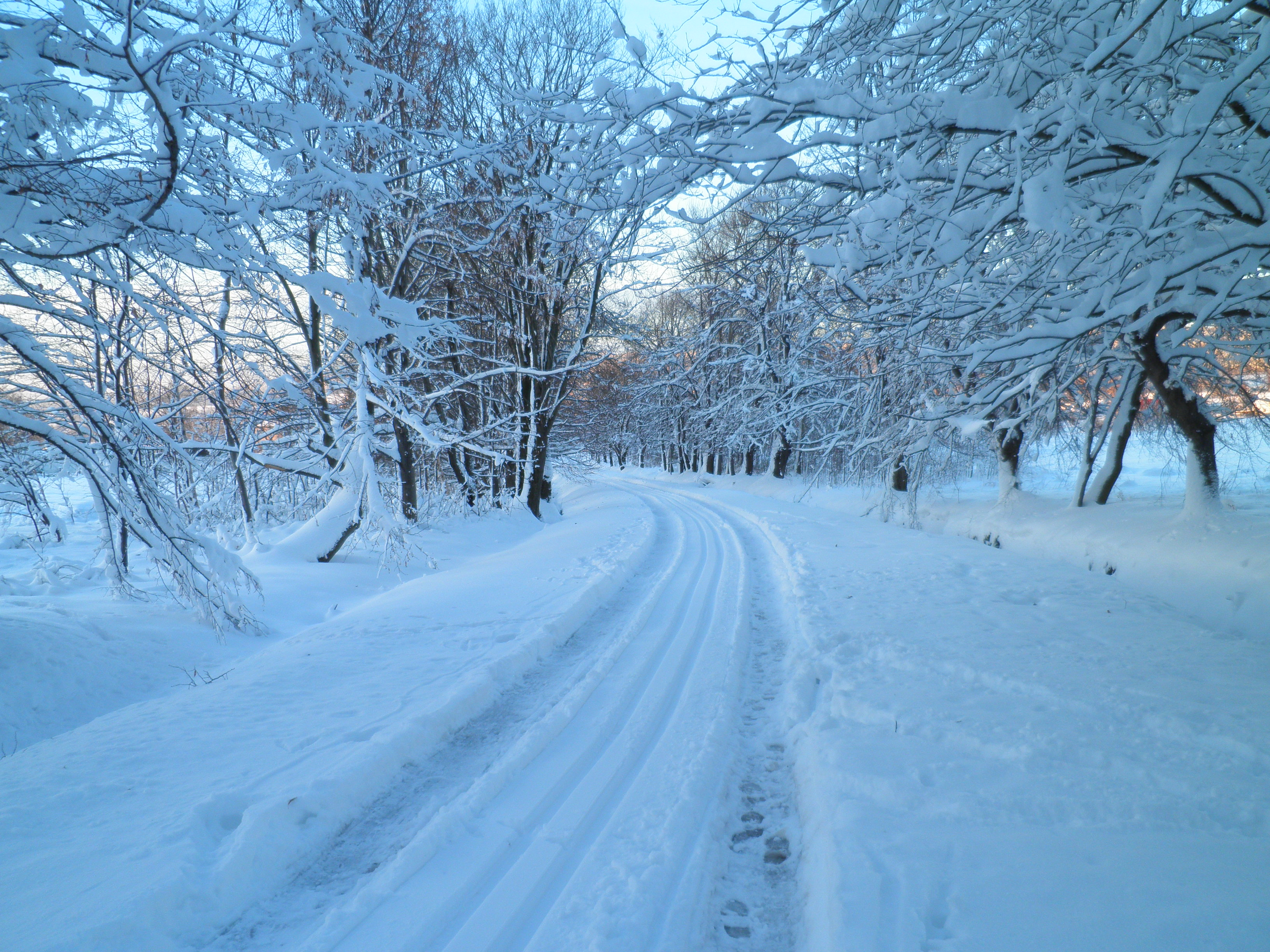 Ukázka upravy stop v okolí Nového Města pod Smrkem